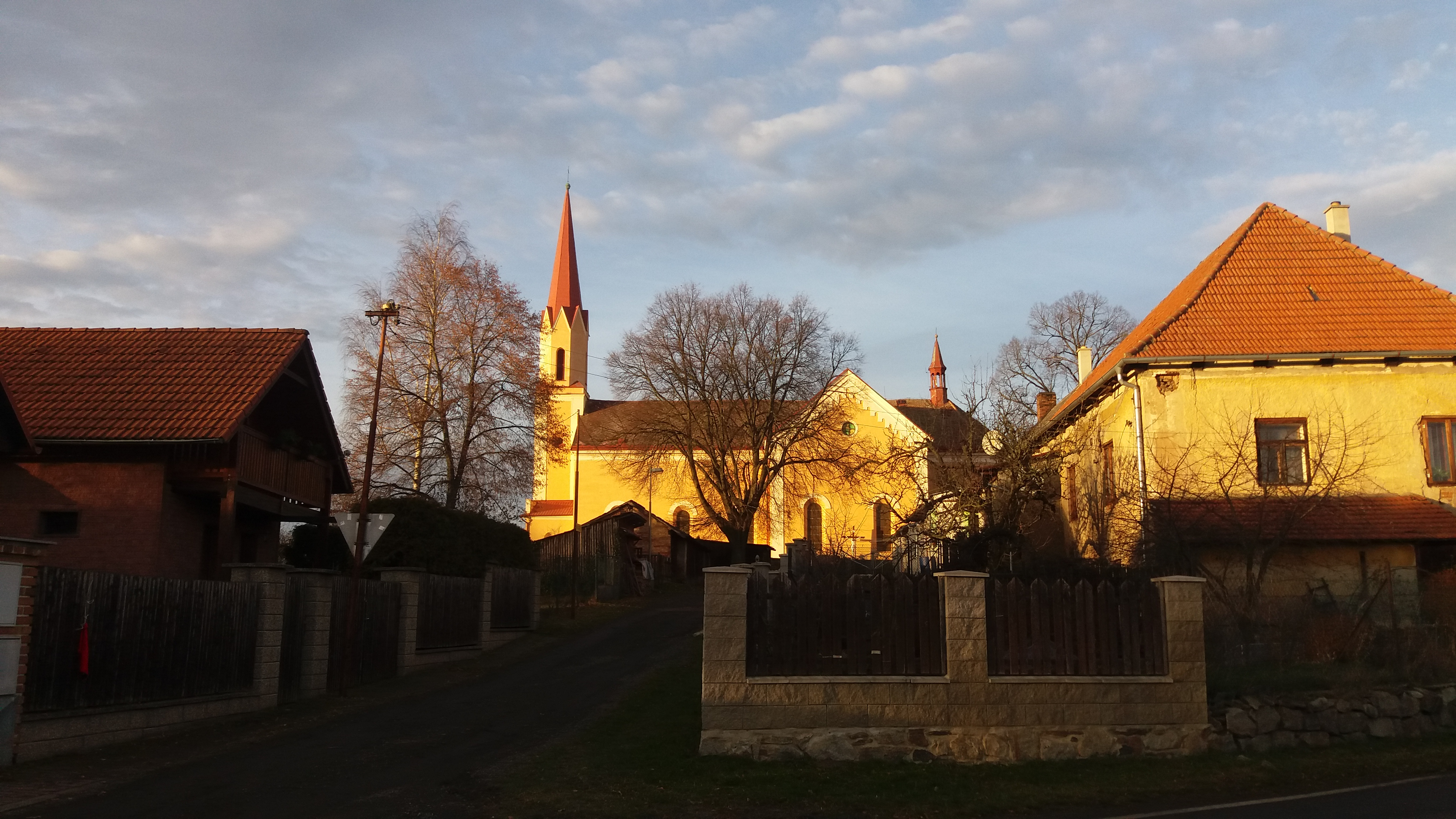 Pohled na kostel Narození Jana Křtitele ve Zbýšově od rybníka. Vpravo bývalé budovy hospodářského dvora, čp. 3 a 1.